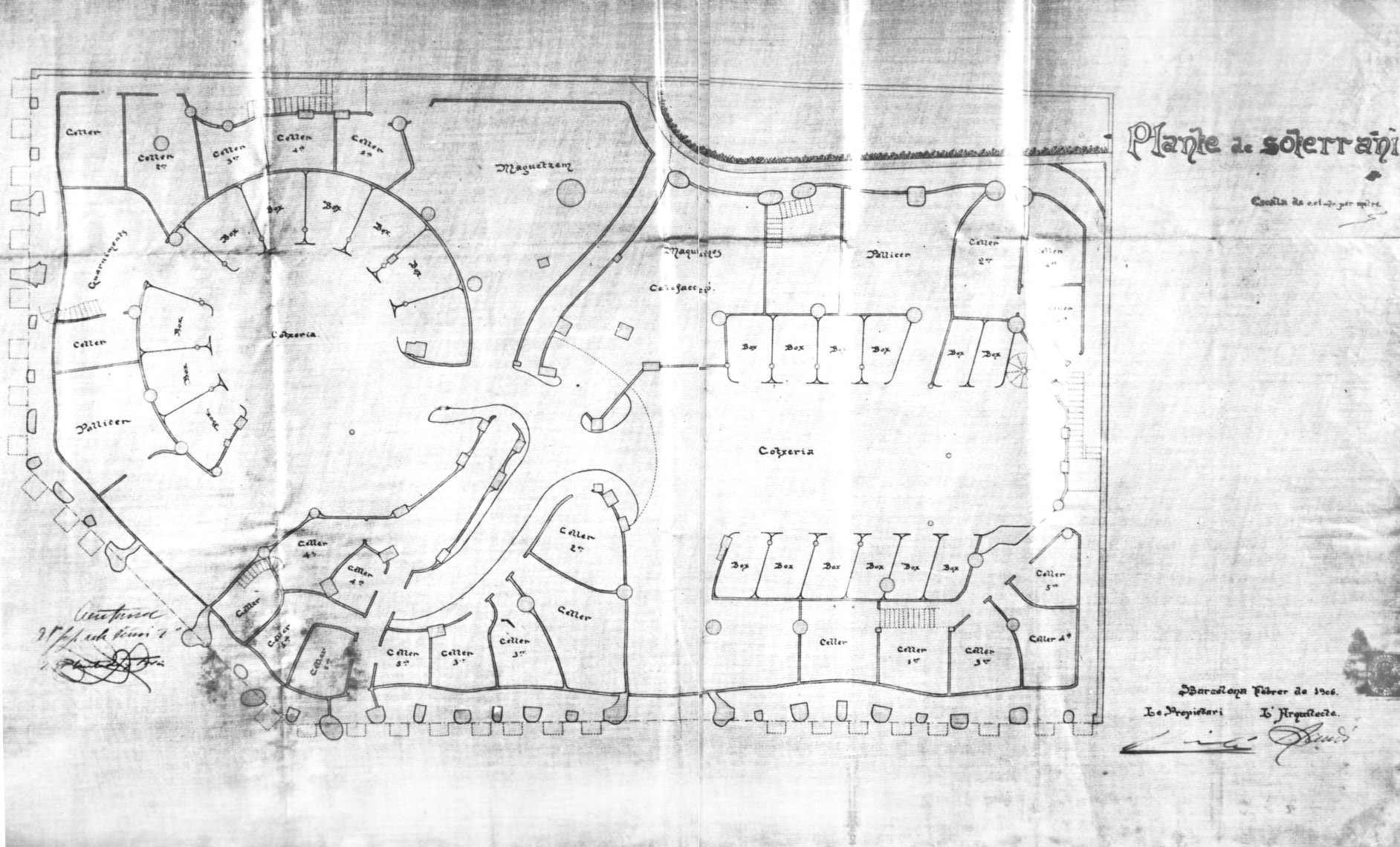 Plano del sótano de la Casa Milà.